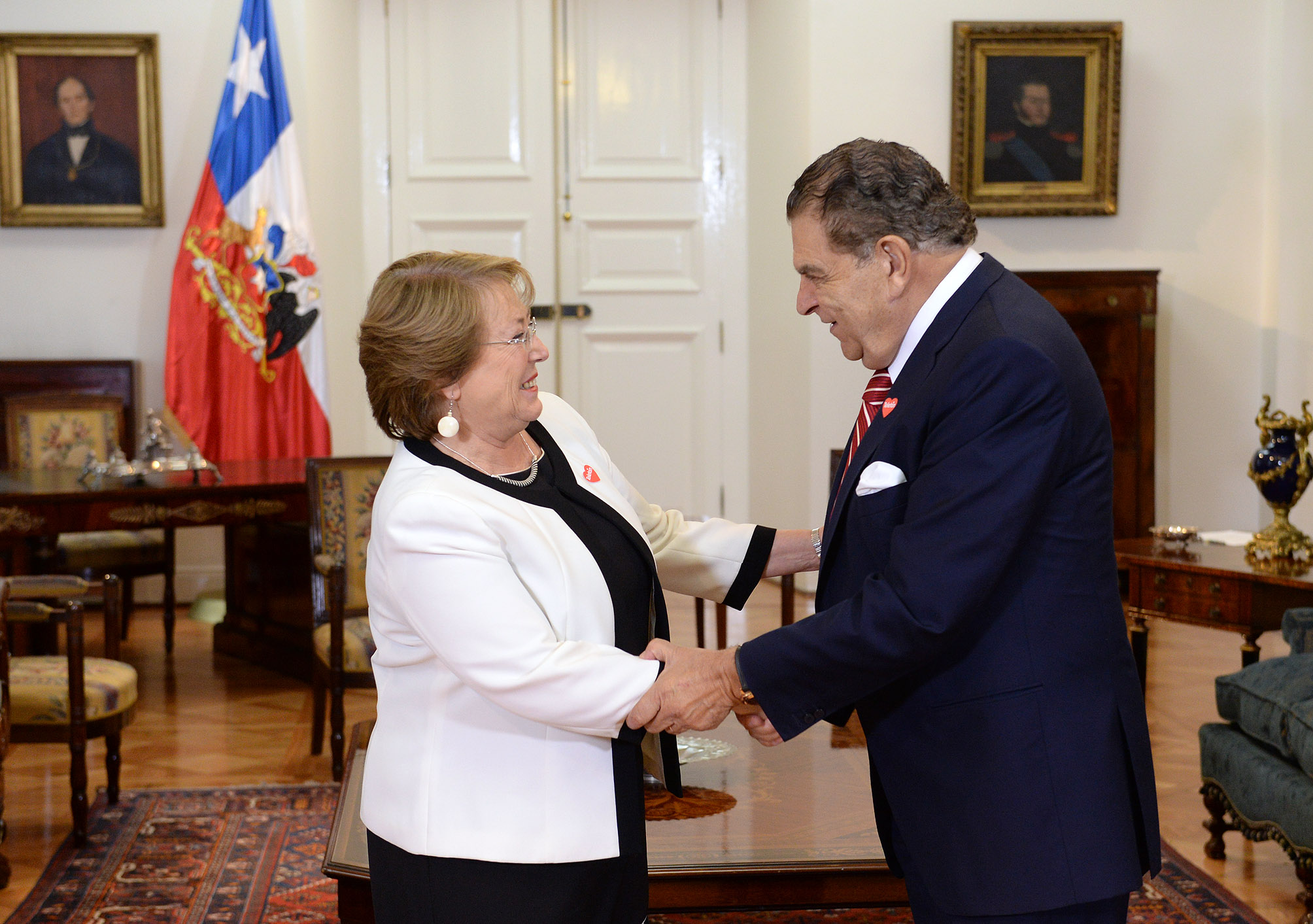 Gobierno de Chile